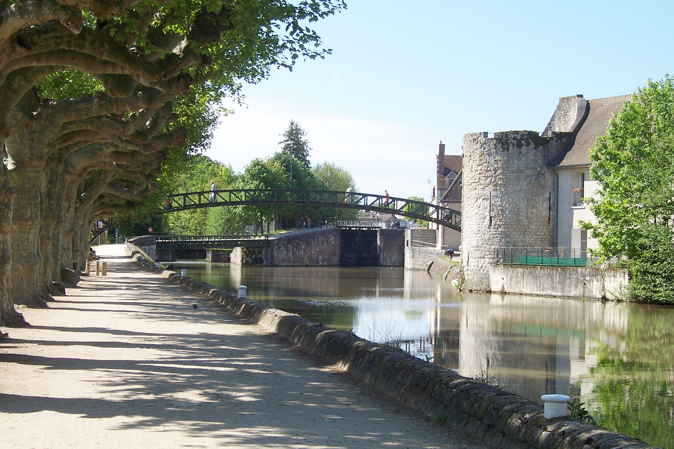 France - Loiret - Montargis - Passerelle Victor Hugo, built by Gustave Eiffel in 1891 over the canal de Briare